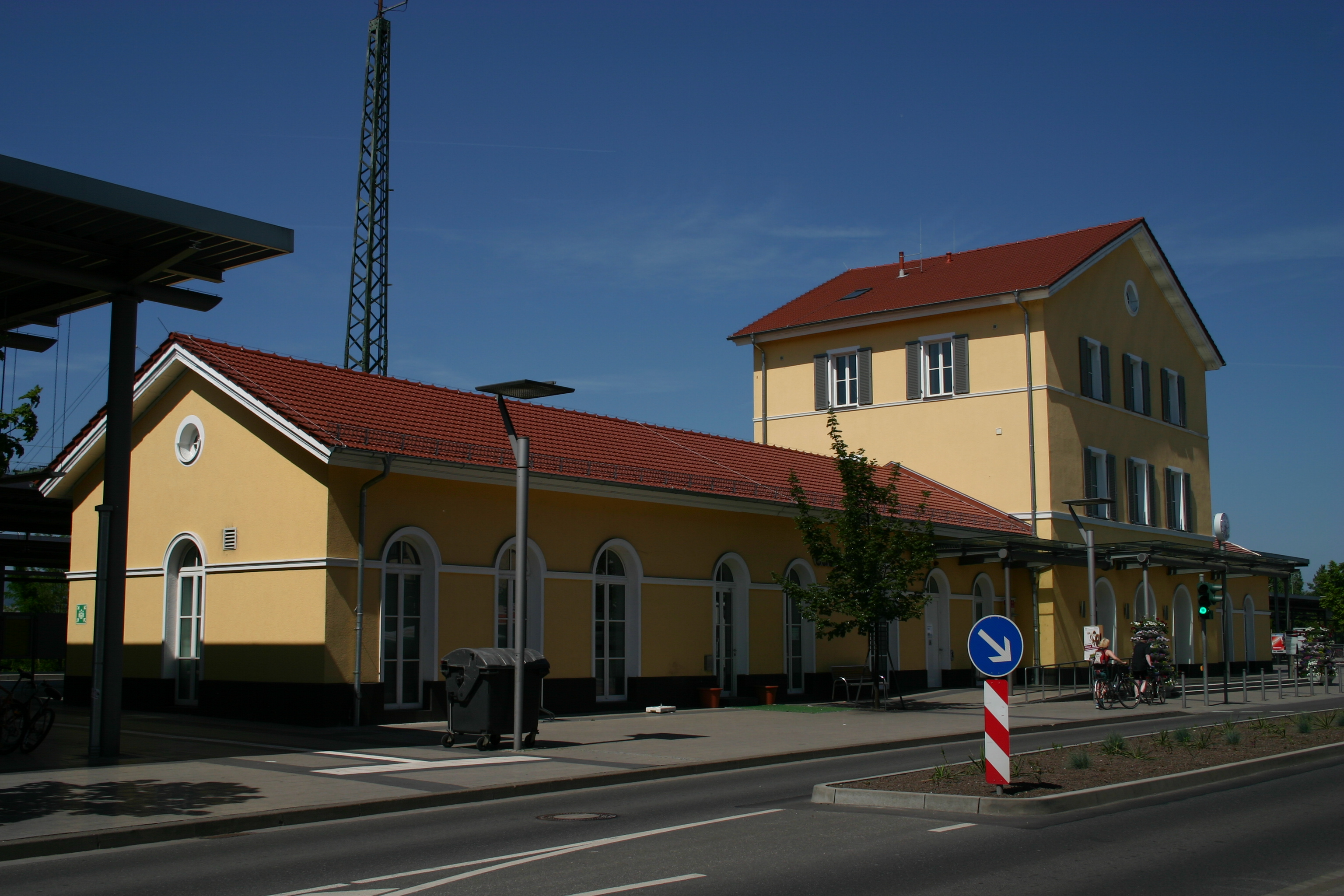 Bahnhof Ingelheim im Mai 2012, von Südwesten aus gesehen (noch im unfertigen Zustand)